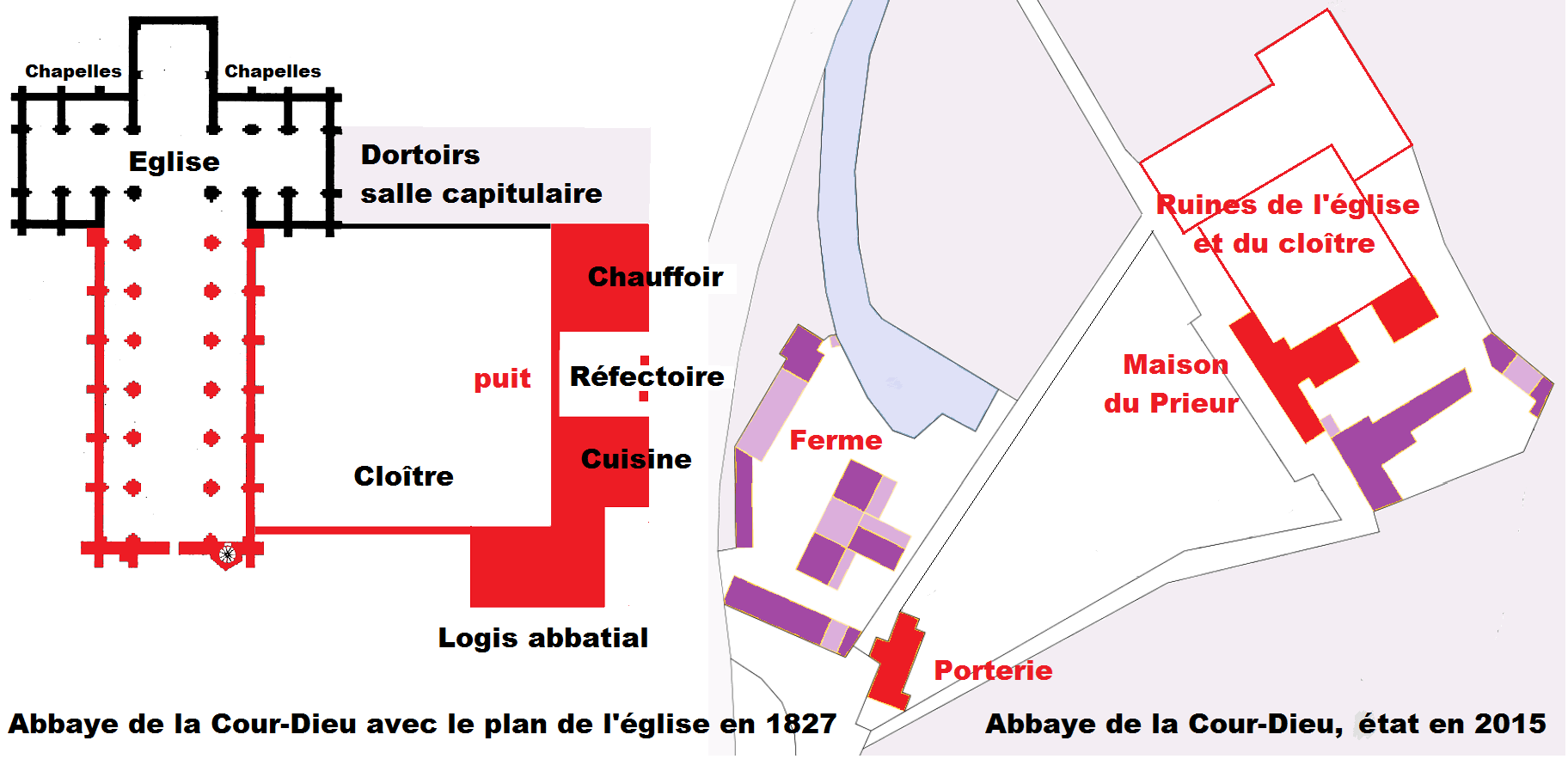 Abbaye de la Cour-Dieu, Ingrannes, Loiret, Plan